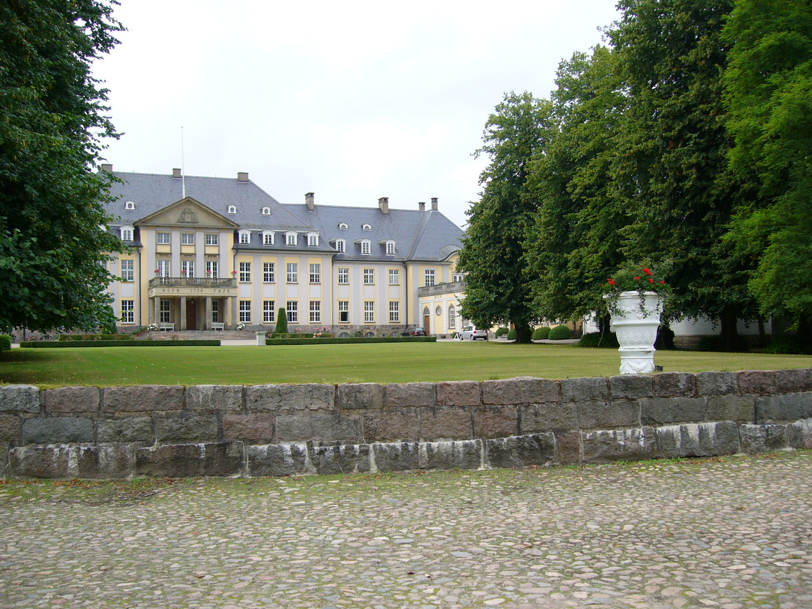 Gut Altenhof bei Eckernförde; Teilansicht des 1722 gebauten Herrenhauses.